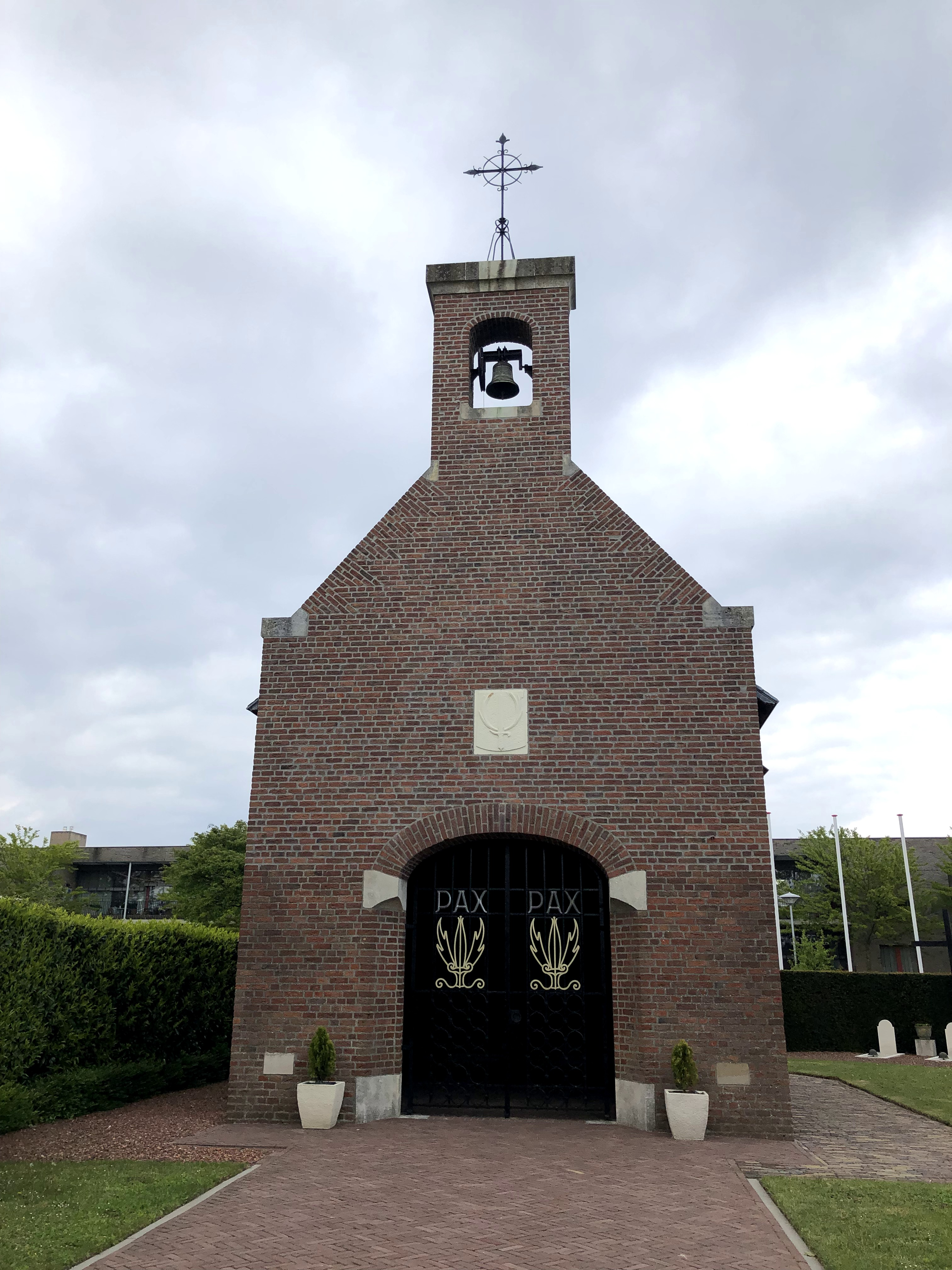 Deze kapel, onthuld op 9 oktober 1949, is gebouwd uit rode baksteen. Boven de zwarte poort hangt het embleem van het Regiment Stoottroepen. De binnenkant van de kapel wordt zowel aan de linker - en rechterkant gesierd met twee grote glas-in-loodramen waarbij elk een andere periode in de twintigste eeuw centraal staat.